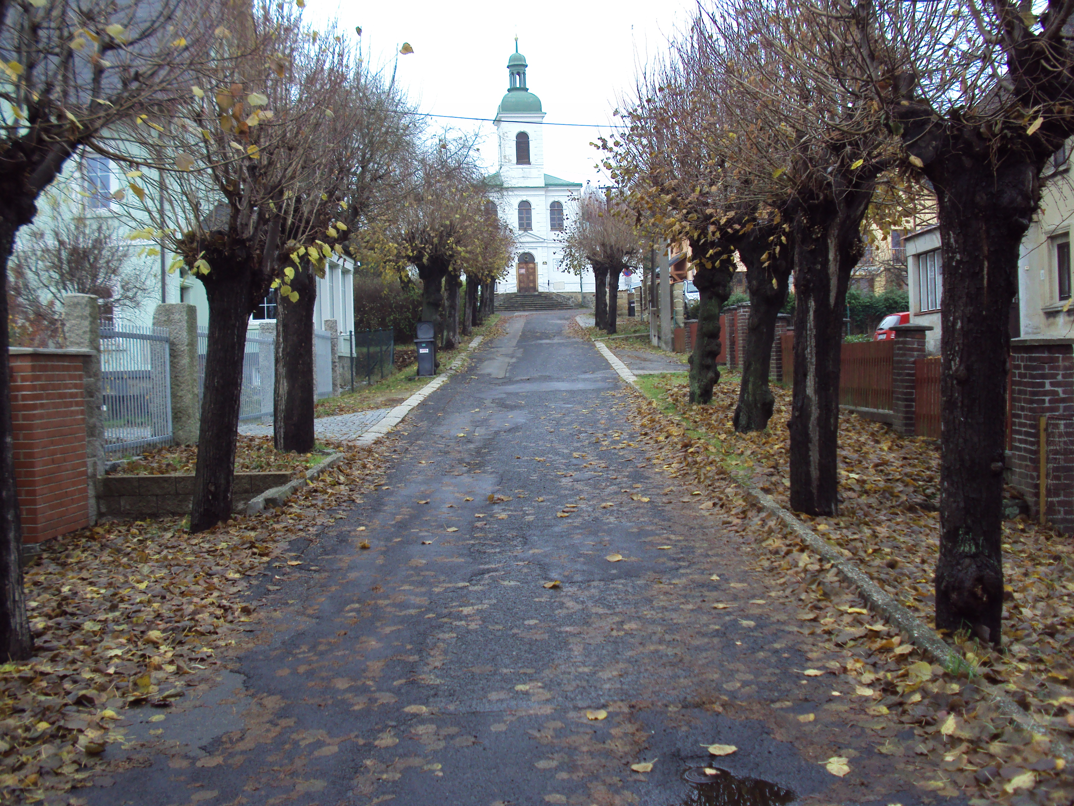 Kostel sv.Ducha, čtvrť Arnultovice v Novém Boru